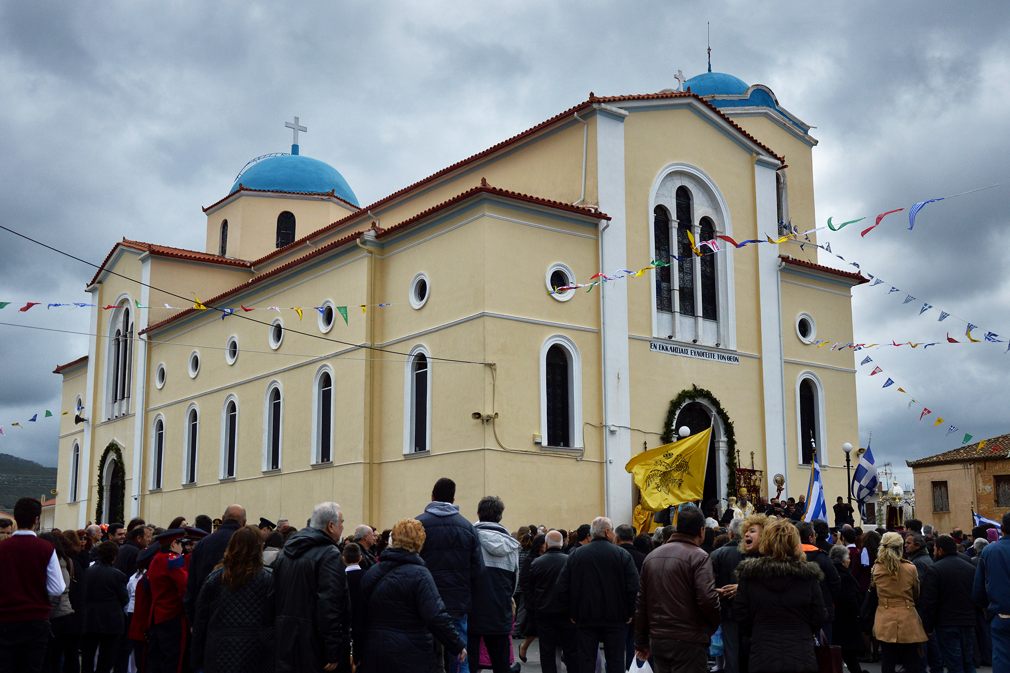 Εκκλησία της Παναγίας στα Φιλιατρά Μεσσηνίας.